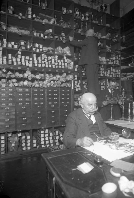 Die Räume der städt. Pfandkammer in Berlin überfüllt, ein Zeichen unserer Not ! Blick in die überfüllte Silberkammer der städt. Pfandleihe in Berlin, wo täglich tausend ihr Eigentum beleihen lassen.